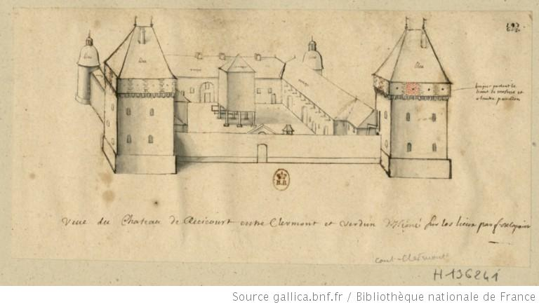 Château de Récicourt XVIIème